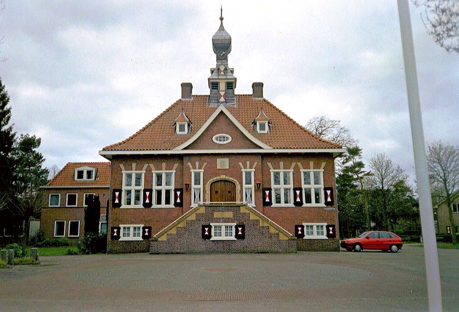 Raadhuis, Raadhuisplein 1, Maarn. Foto genomen op 11 april 2004 en geupload door maker.